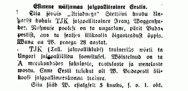 Ungarlasest jalgpallitreeneri jõudmine Tallinnasse. Tekst: Esimene wäljamaa jalgpallitrainer Eestis. Eila jõudis „Ariadnega” Stettiini kaudu Un- garist kohale TJK jalgpallitrainer Franz Woggenhu- ber. Rahwuse poolest on ta ungarlane, pärit Buda- pestist, kus ta sealses ülikools õigusteadust õppis. Wana on W. praegu 28 aastat. TJK (Tall. jalgpalliklubi) traineriks wõeti ta Ungari jalgpalliliidu soowitusel. Wõistelnud on ta A meeskondades sakslaste, rootslaste ja wenelaste wastu. Enne Eesti tulekut oli W. Budapesti üli- kooli jalgpallimeeskonnas trainer. Siia jääb W. esialgselt 5 kuuks, s. o. 1. okt.